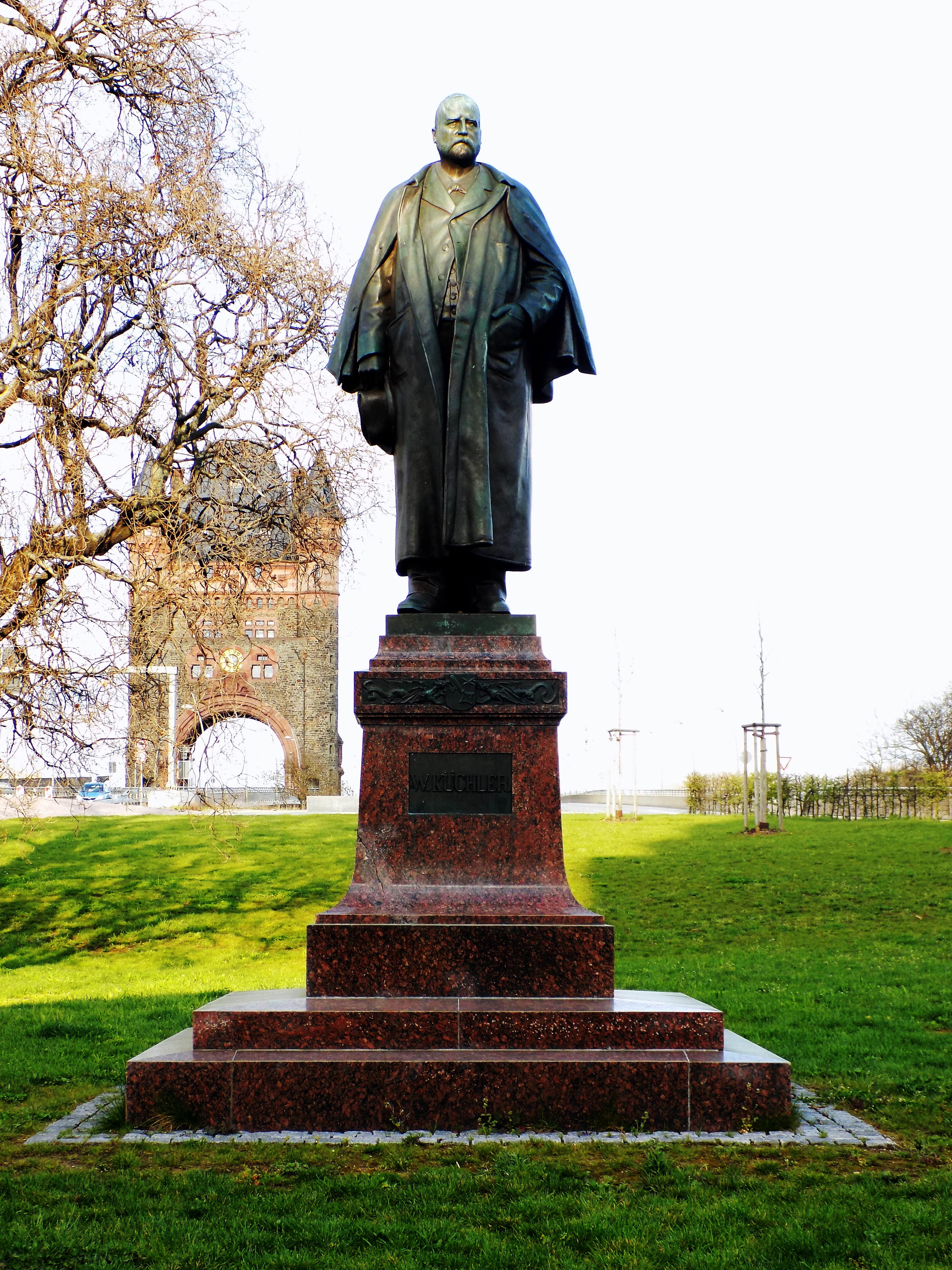 Da Küchlerdenkmal in Worms